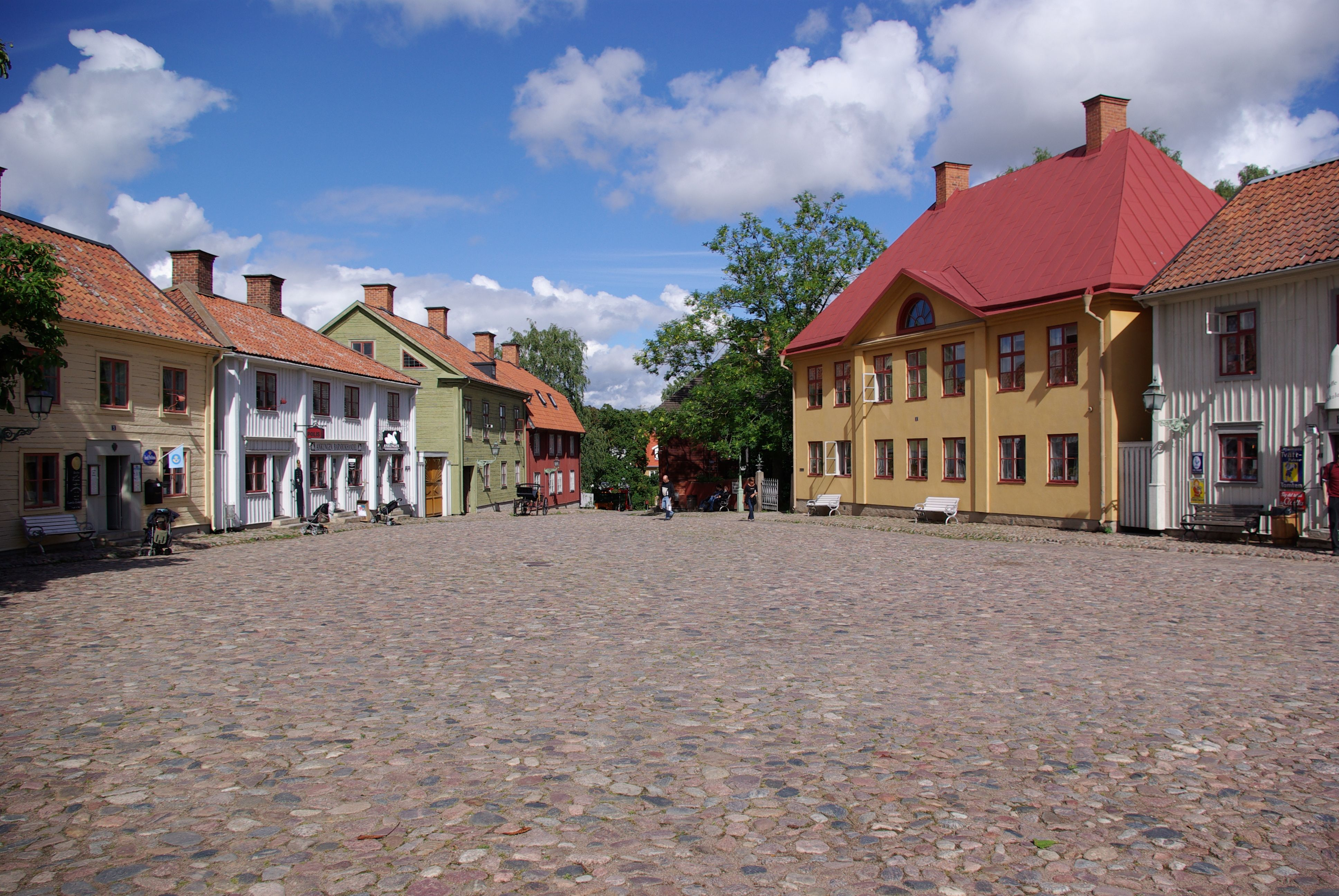 Linköping, Schweden, Gamla Linköping, Der Hauptplatz des Viertels, rechts die Post, das Polizeimuseum, links das Cafe